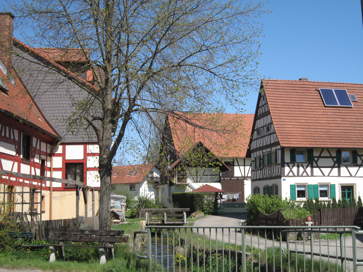 Der Eller- bzw. Leitenbach fließt zwischen den Denkmälern St.-Martin-Straße 10 (links) und 8 (rechts).